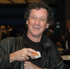 Uli Bauer bei einem Künstlerempfang im Münchner Gasteig 2004